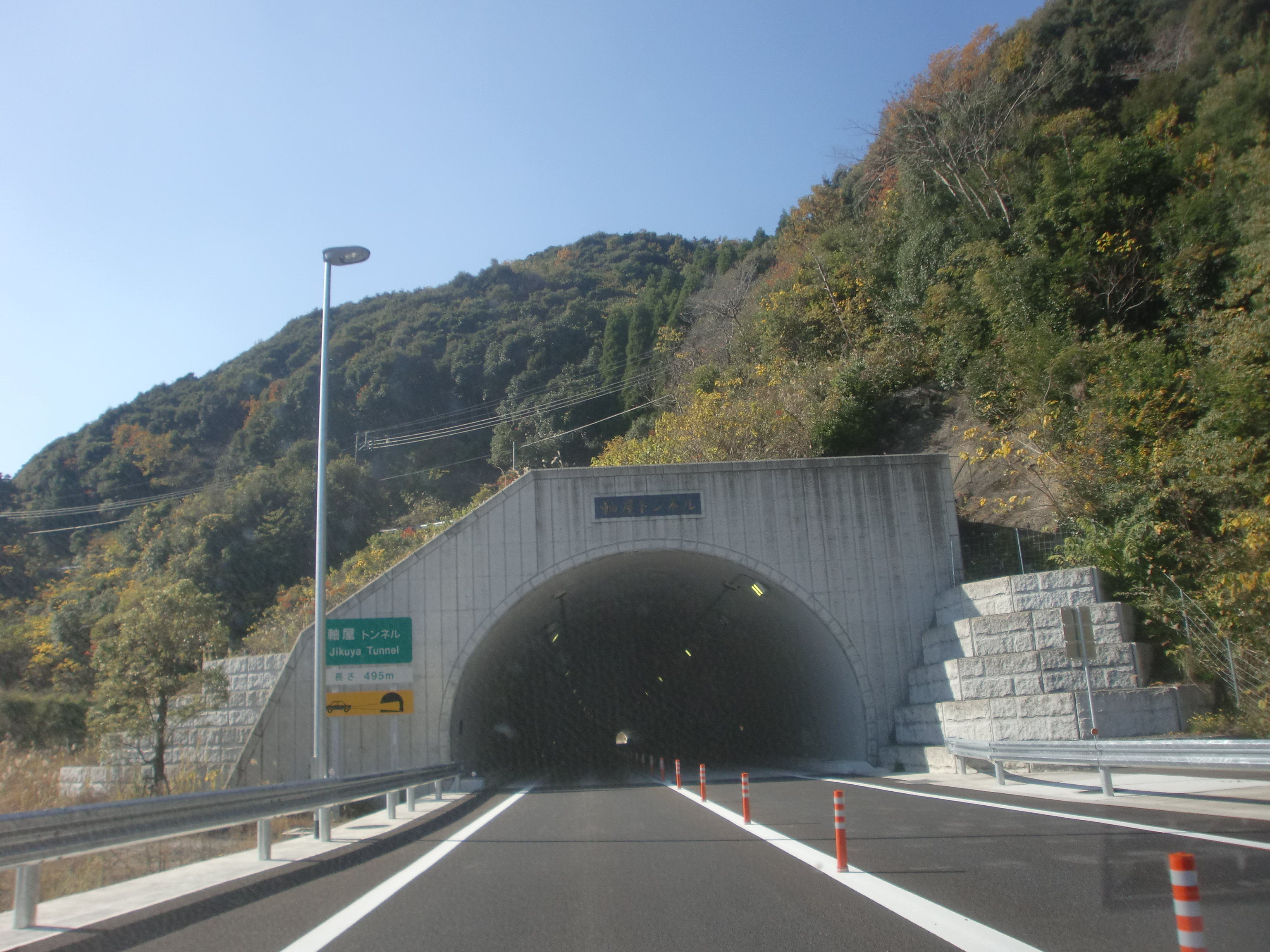 南薩縦貫道軸屋トンネルを鹿児島方面から川辺方面を望む。